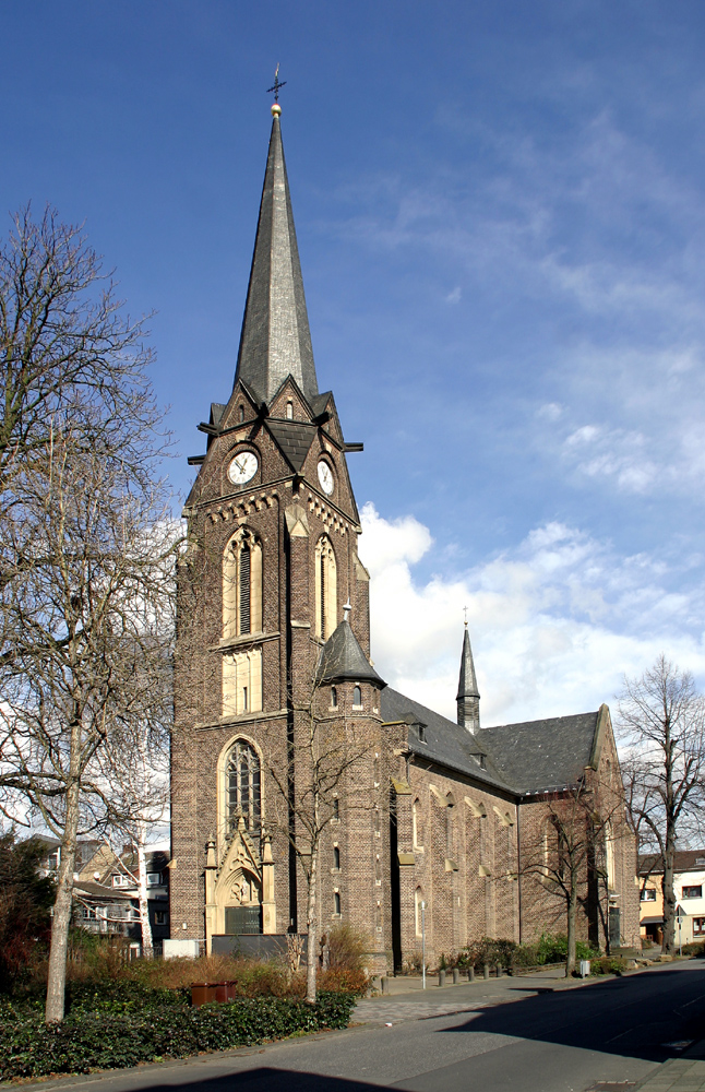 Neugotische Pfarrkirche „St. Mariä Himmelfahrt“ im Troisdorfer Stadtteil Spich